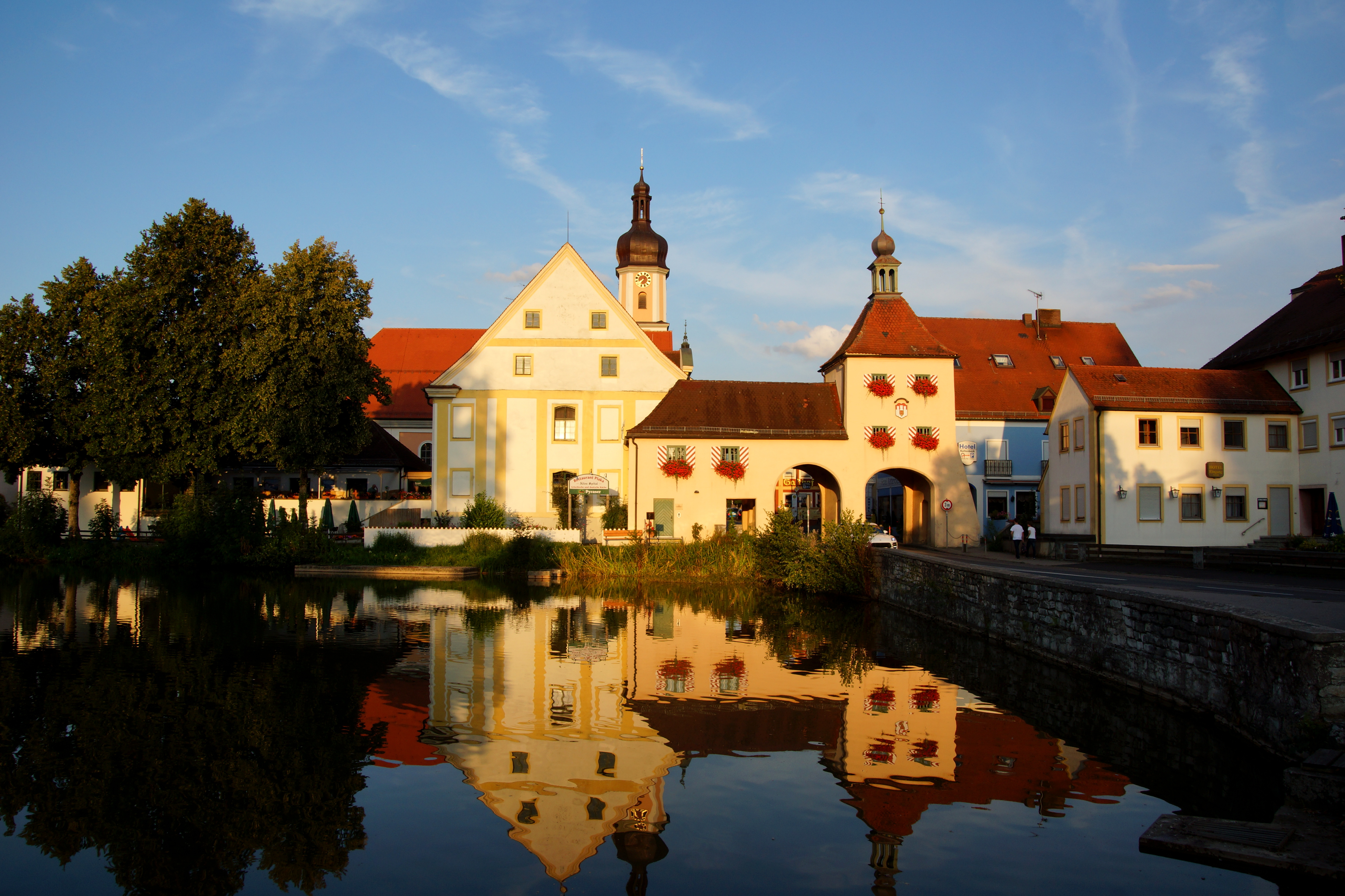 Der Markt Allersberg: „Unteres Tor“